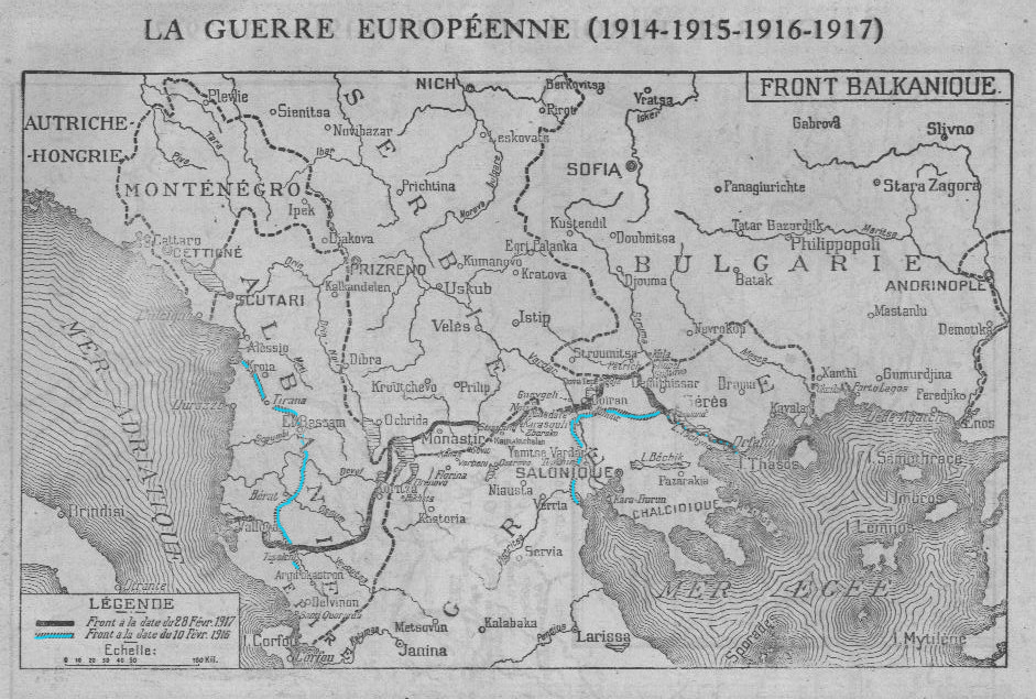 une carte montrant l'avance du front en février 1917 en Macédoine. Carte publiée dans le journal Le Pays de France n° 125 page 14.